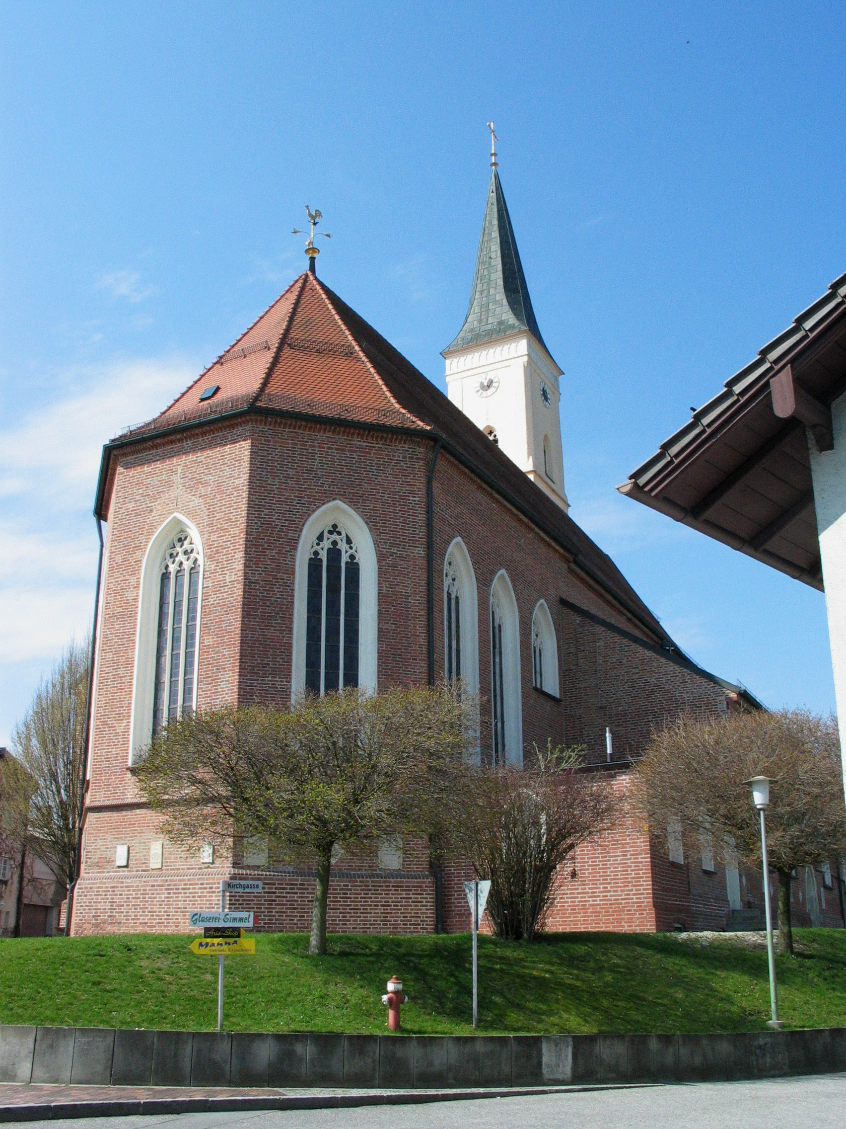 Frontenhausen, Kath. Pfarrkirche St. Jakob.